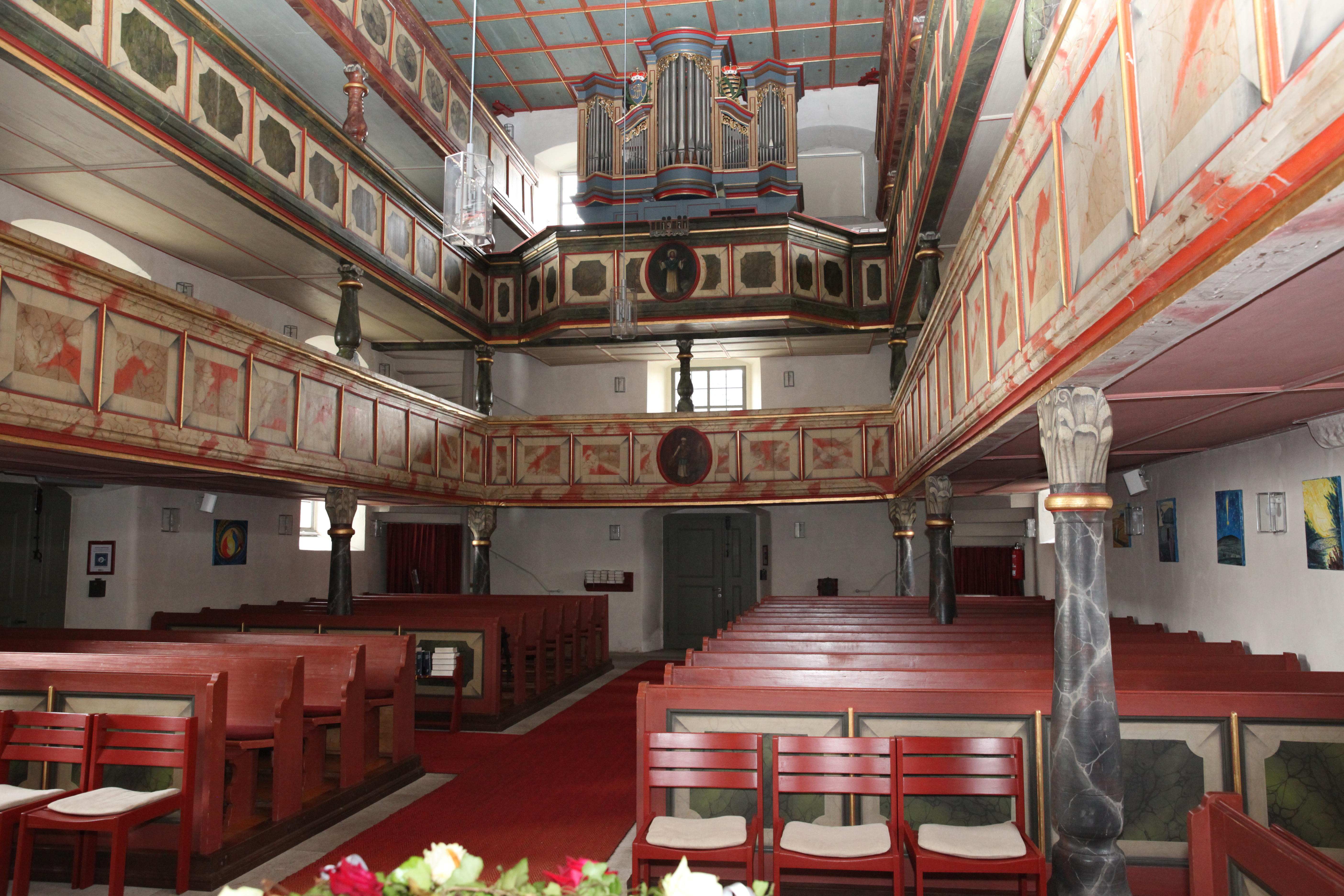 Evangelische Pfarrkirche in Scherneck